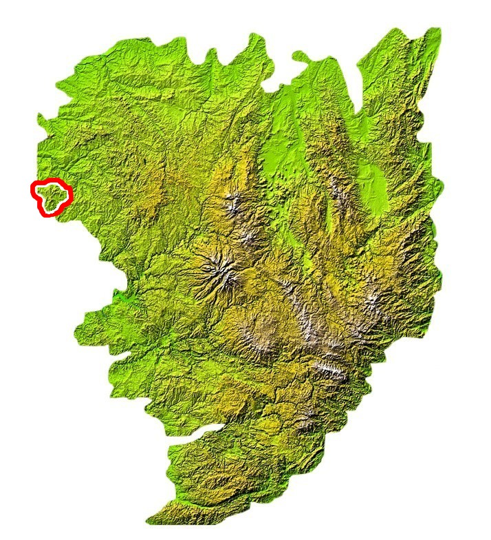 Situation des Monts de Châlus surla carte du massif central